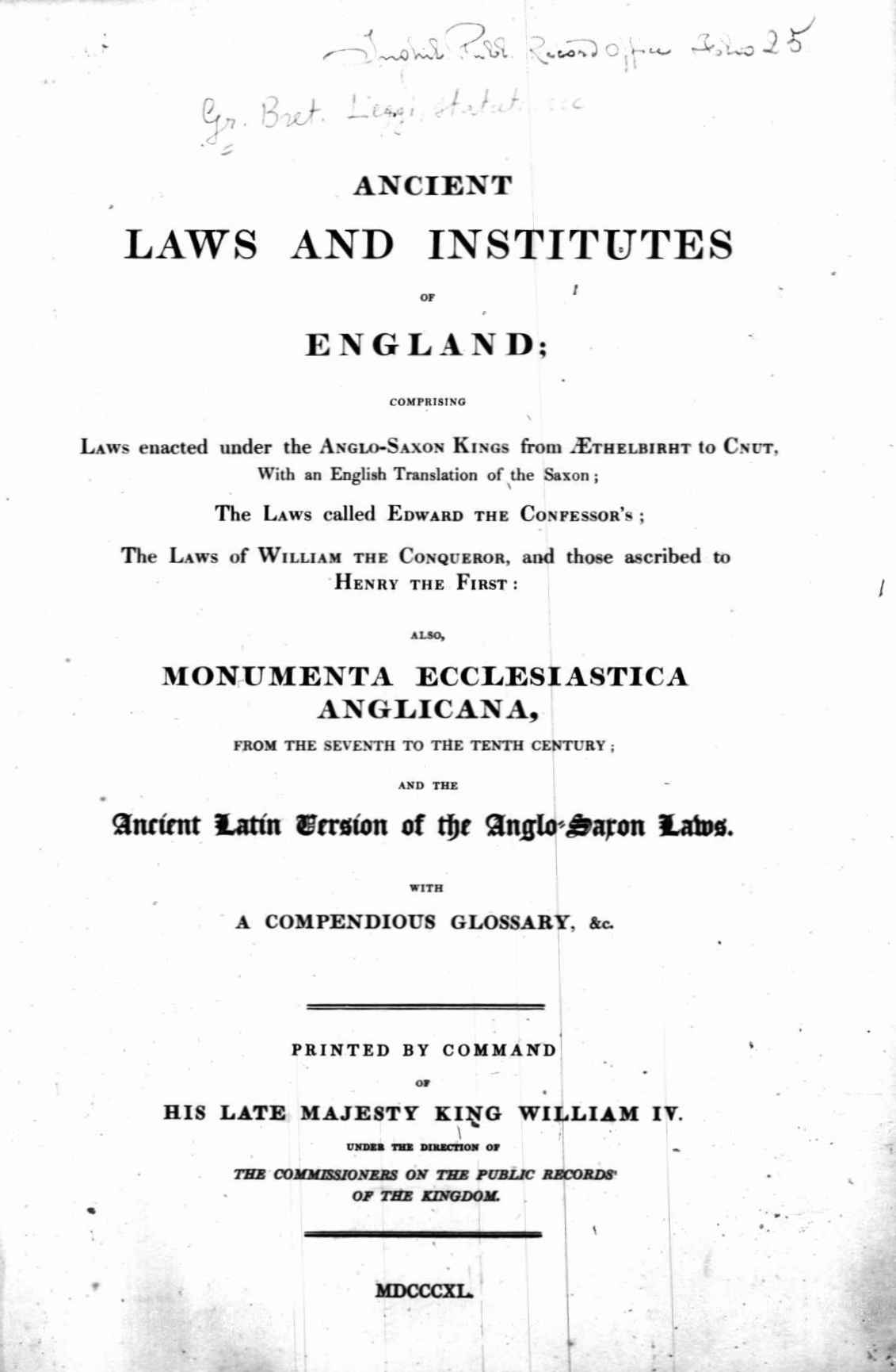 Frontespizio